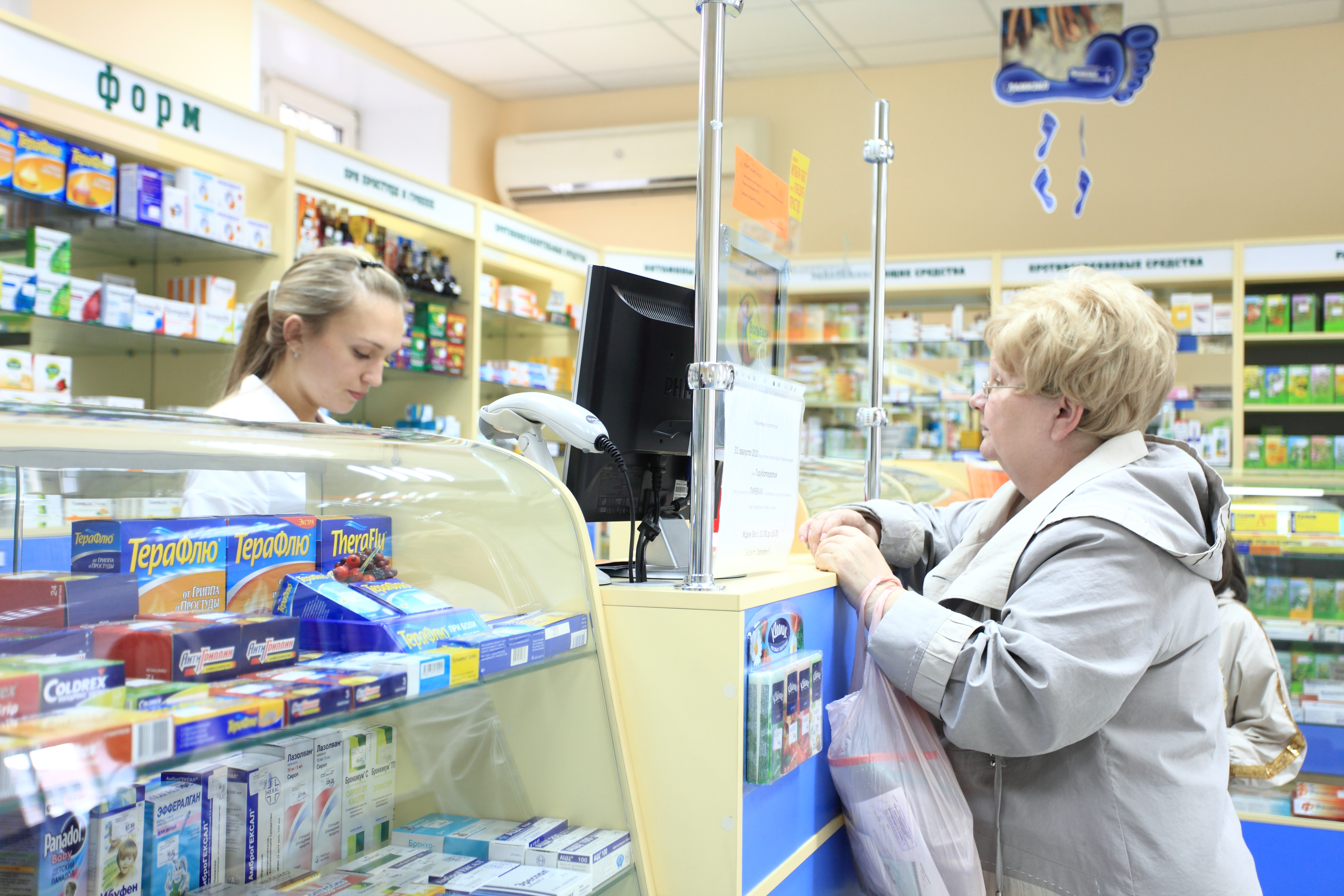 Продажа медикаментов